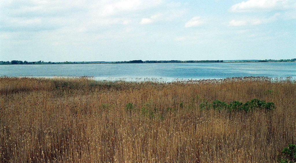 Widok na jezioro Łuknajno na Mazurach